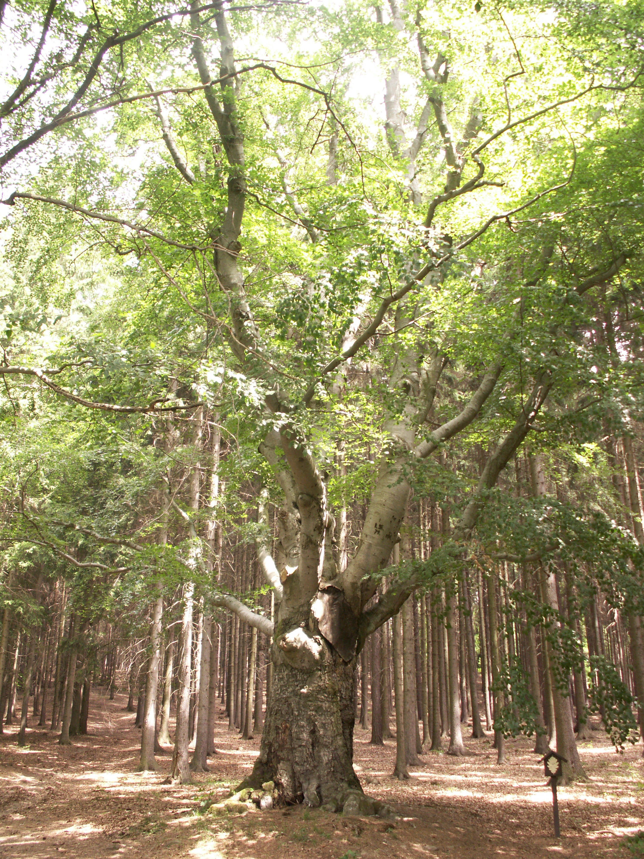 Žižkův buk u Dobré Vody (část obce Malčín), okres Havlíčkův Brod, odhad stáří 500-600 let, obvod kmene 480 cm